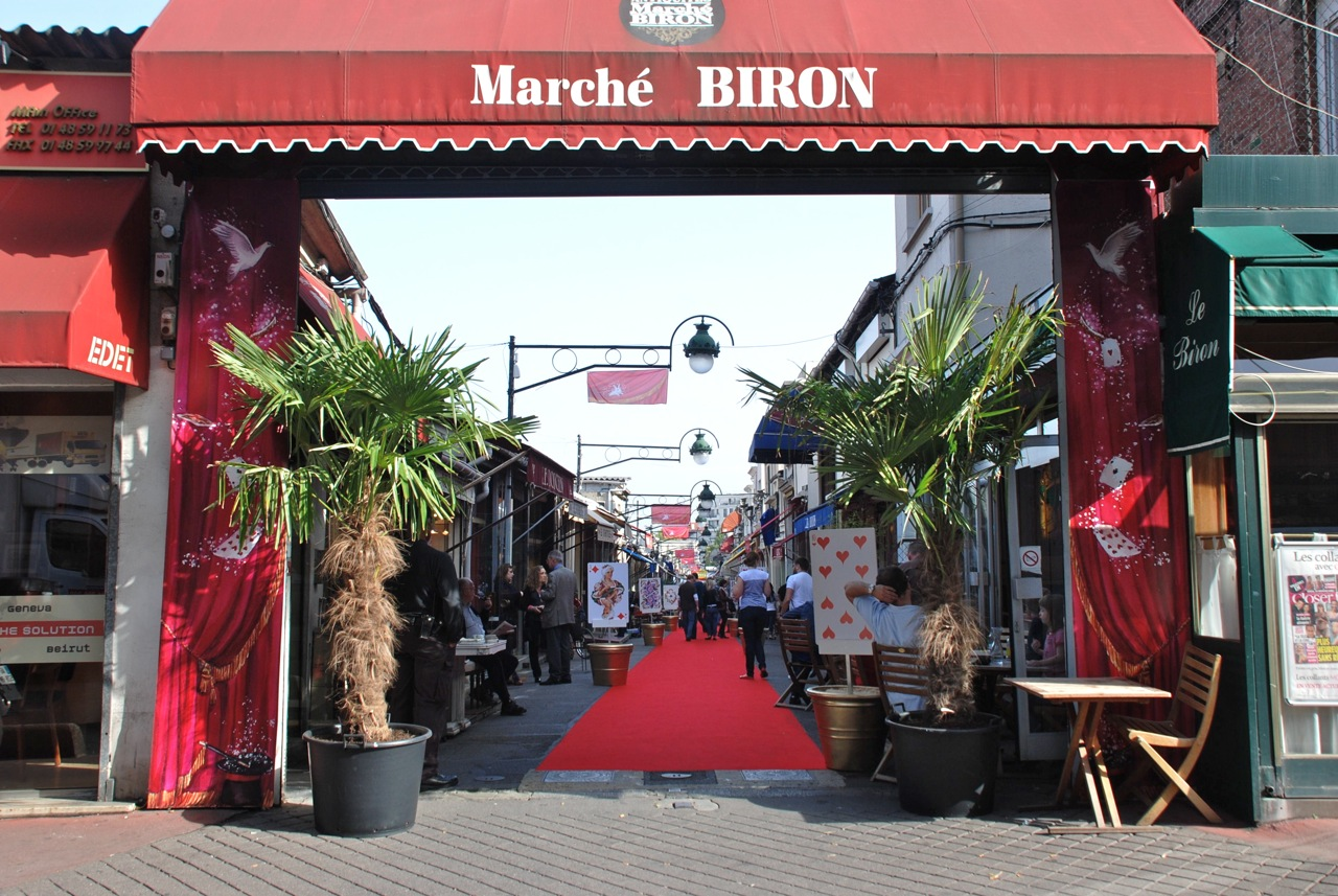 Le Marché Biron - 220 Antiquaires et Marchands d'Art